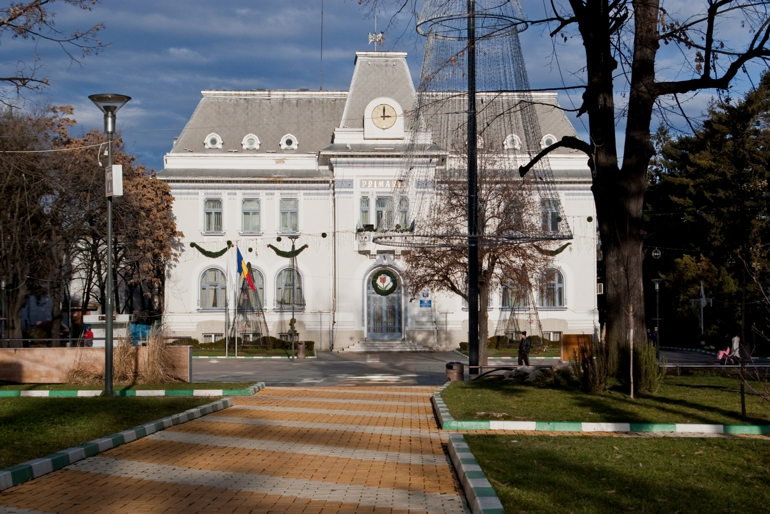 Fotografia prezinta Primaria din Pitesti.